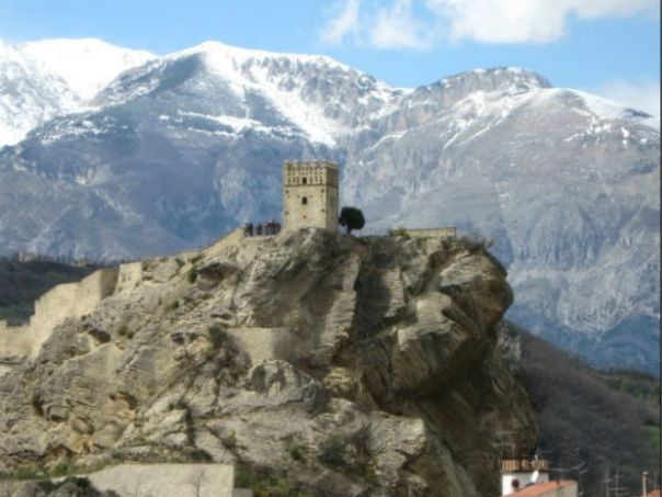 Roccascalegna (CH)